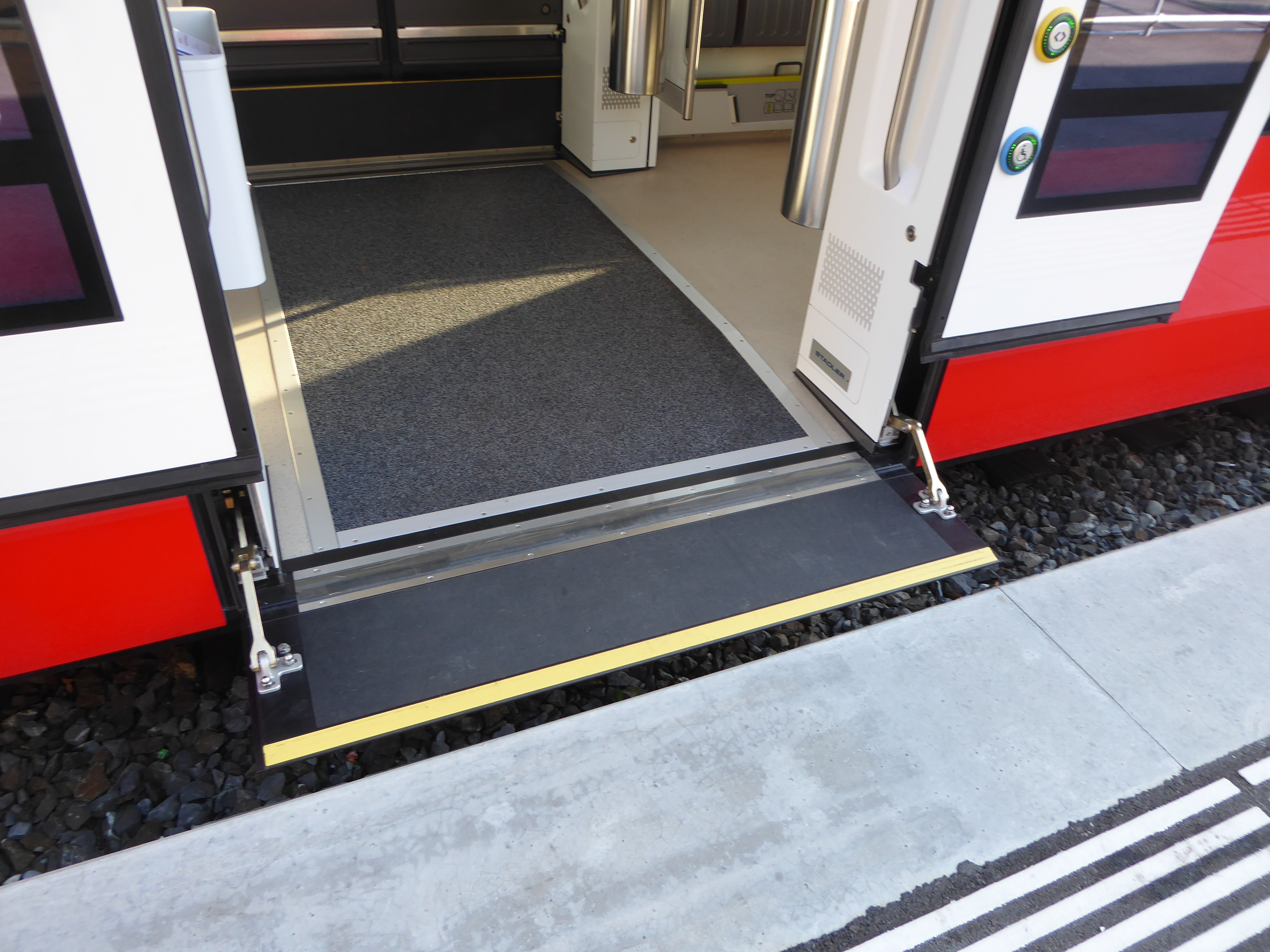 Klapptritt eines ABe 8/12 „Tango“ der Appenzeller Bahnen (AB).